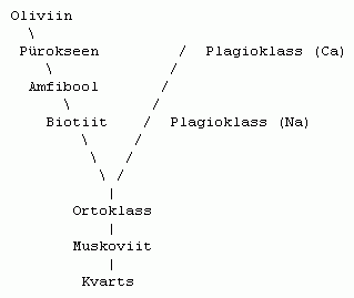 Boweni skeem